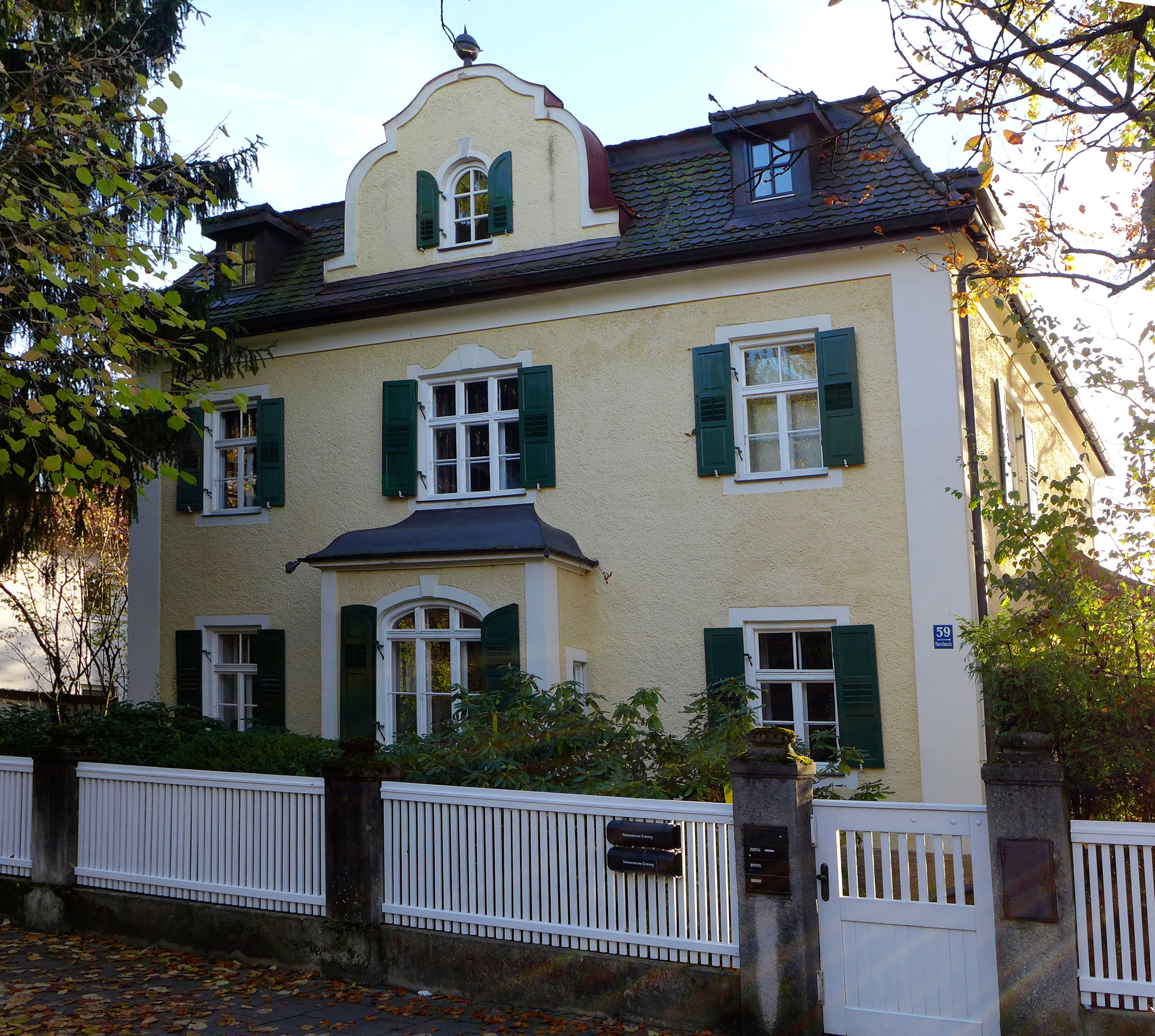 Marschnerst 59, München